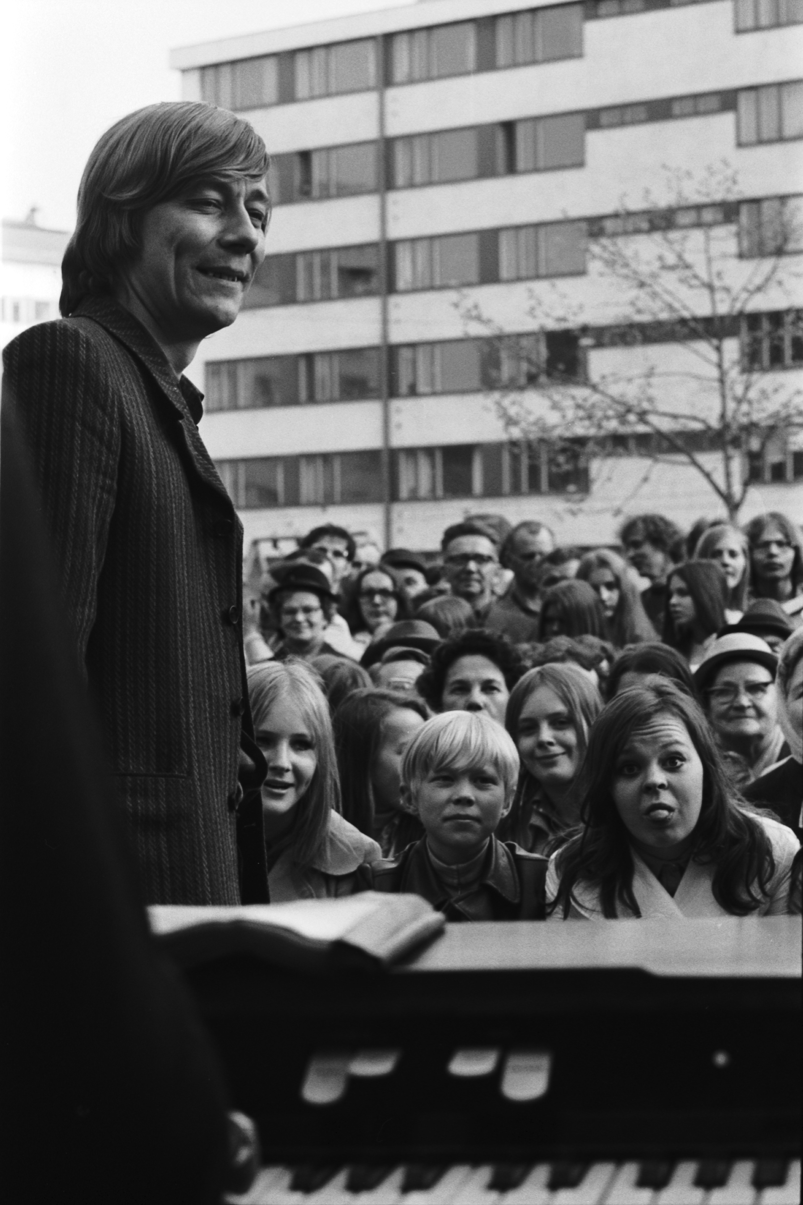 Toimittaja Hannu Taanila sekä yleisöä Karhupuistossa Helsingin juhlaviikkojen puistotapahtuman aikaan.